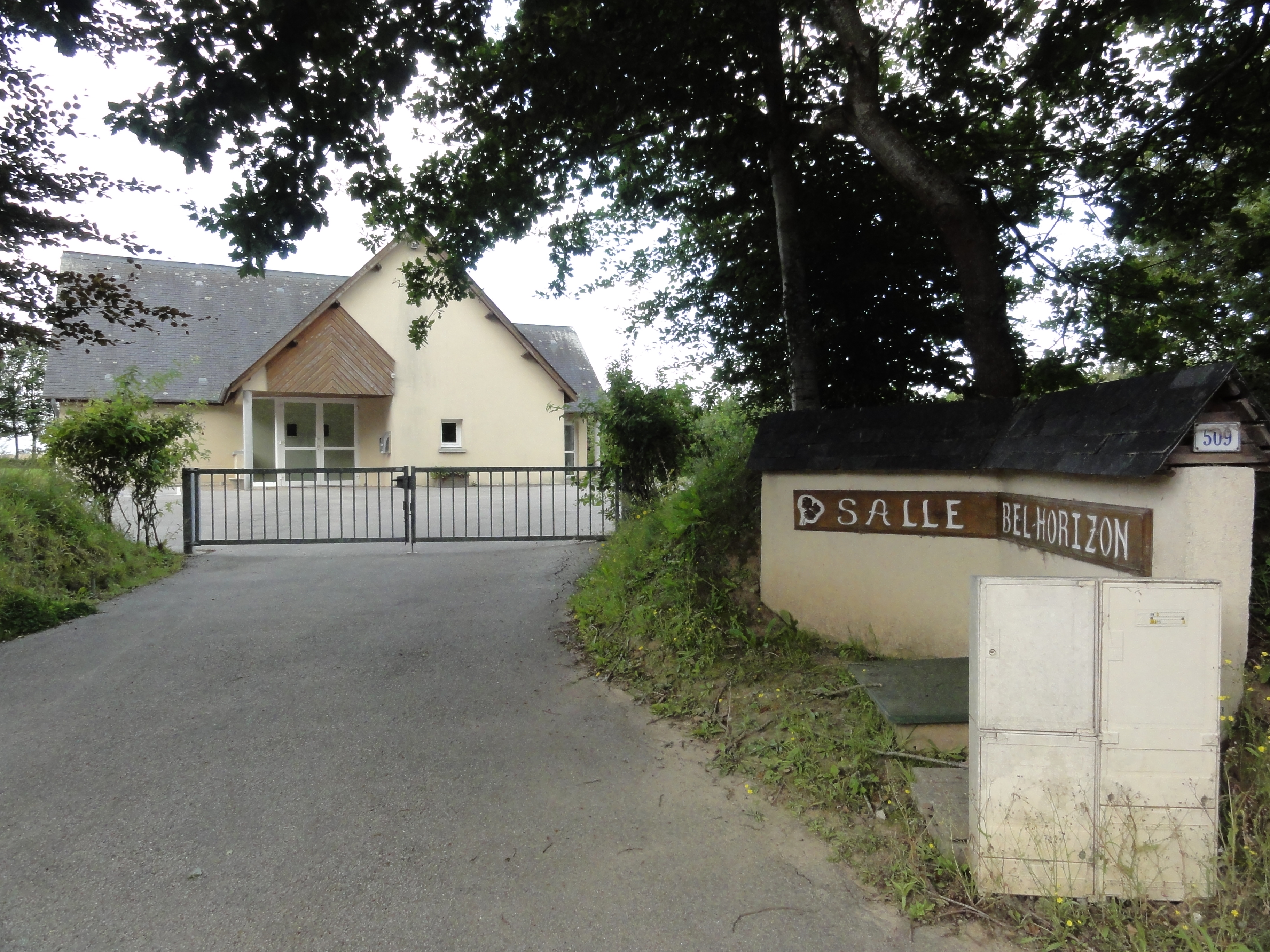 Gonzeville (Seine-Mar.) salle Bel Horizon